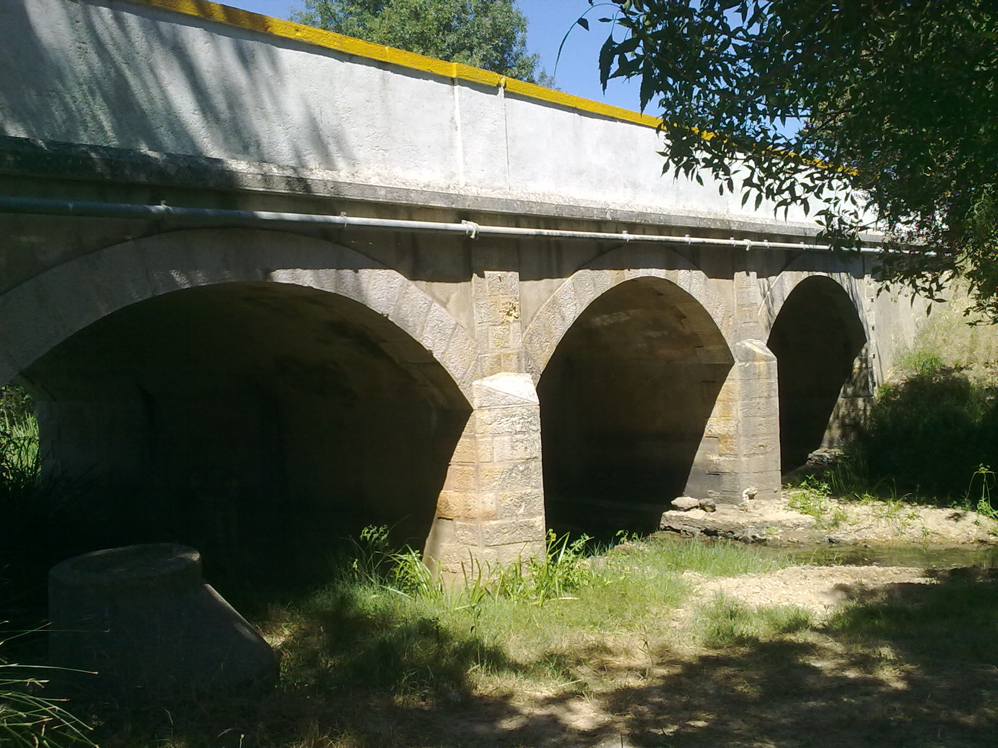 Ponte sobre a Ribeira de Seiça, na localidade de Estremadouro, Seiça, Ourém.